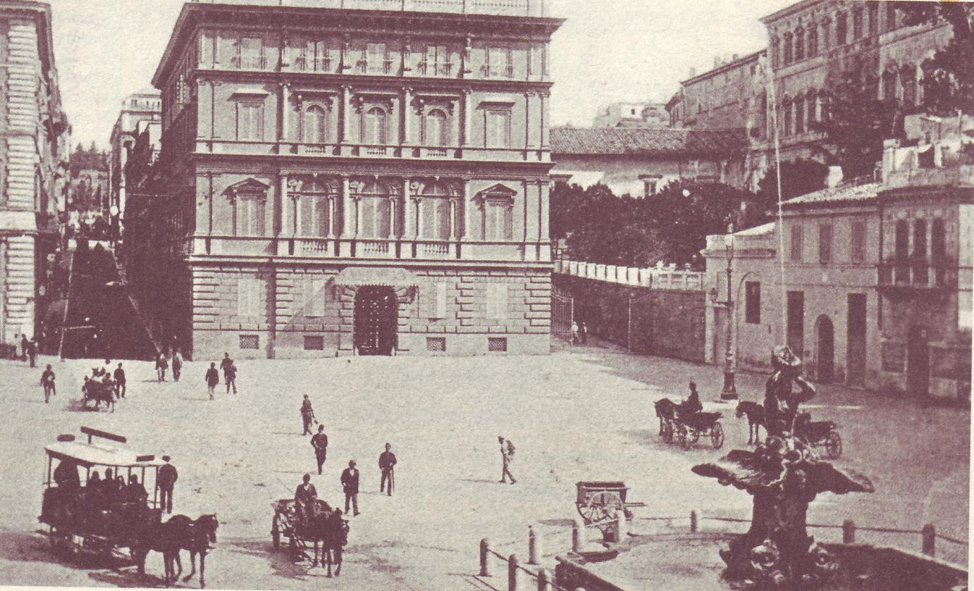 Roma, piazza Barberini prima dell'apertura di via Barberini avvenuta nel 1926-32. Si noti l'omnibus a cavalli sulla sinistra.